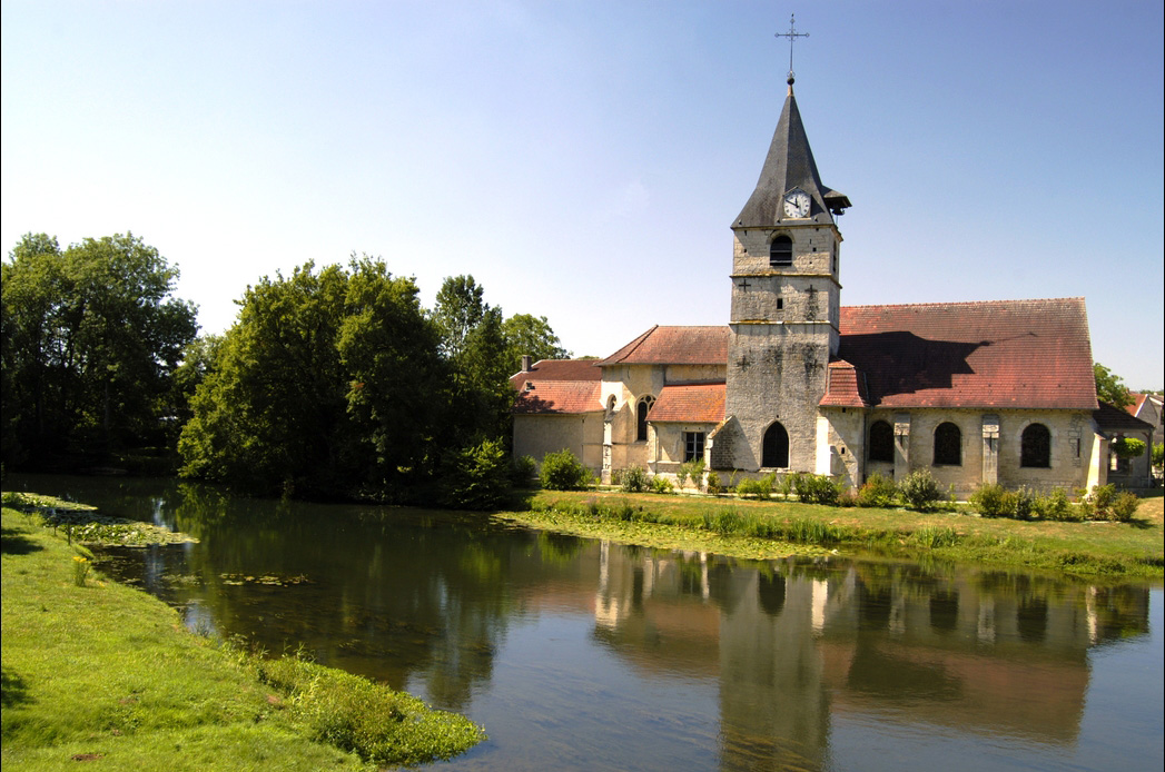 La Marne